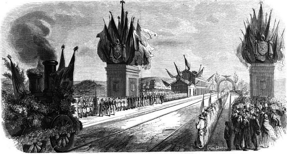 Dessin de la gare d'Épinal décorée et pavoisée pour l'inauguration de la ligne par l'empereur Napoléon III le 28 juin 1857